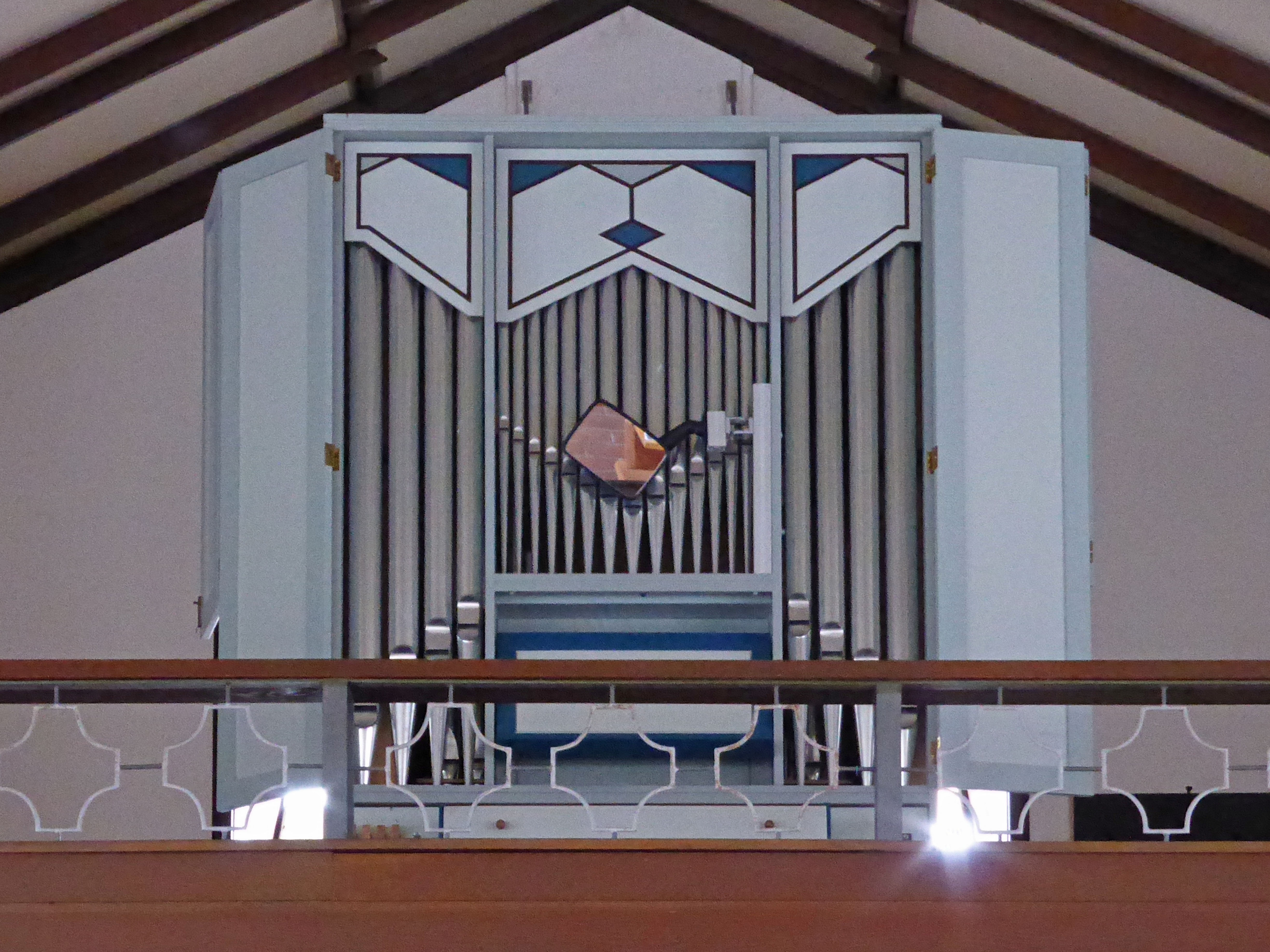 Orgel der katholischen St.-Raphael-Kirche in Parsau.